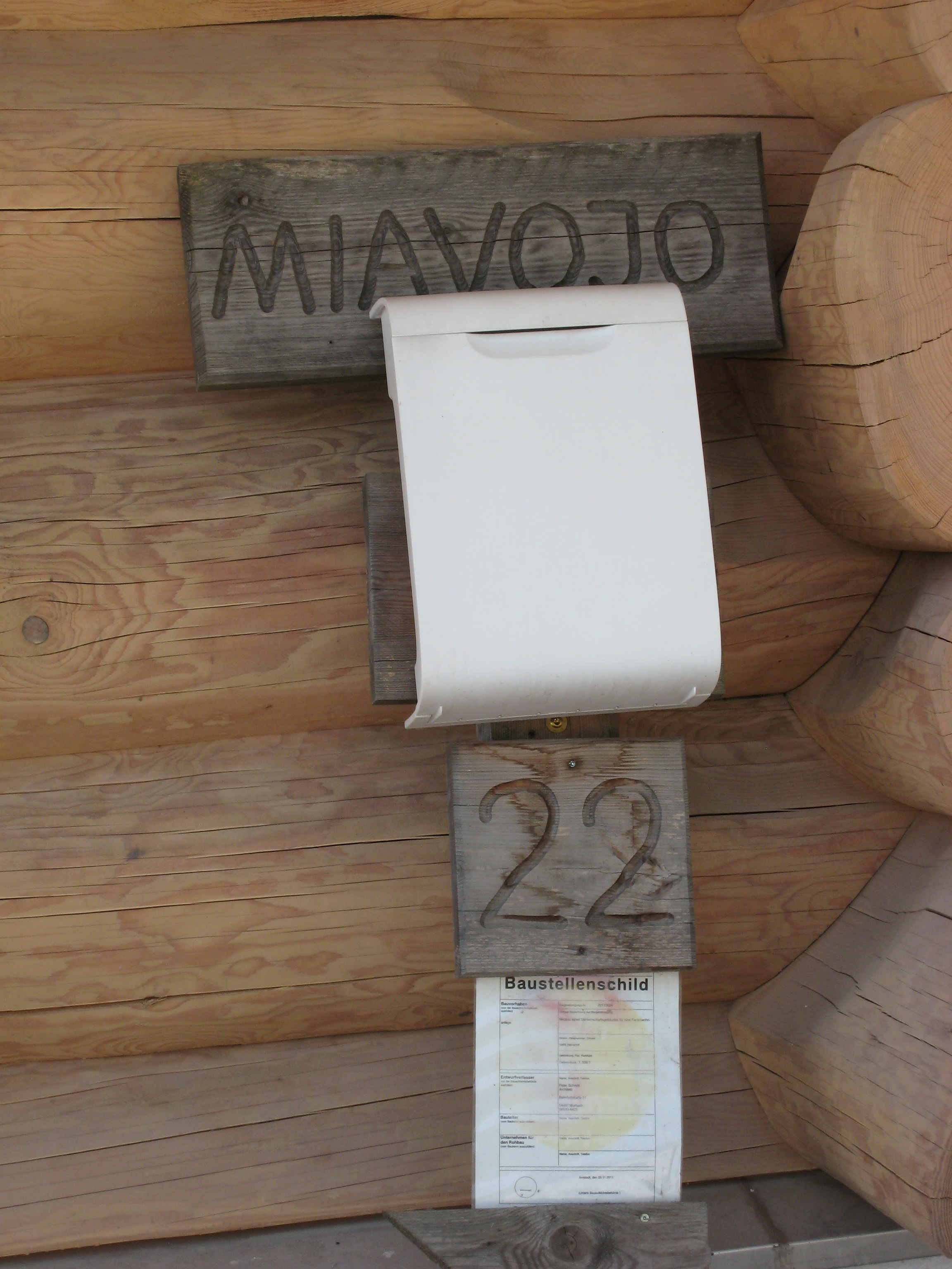 Event- und Tagungszentrum Miavojo in Oehrenstock, Langewiesen.